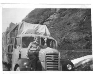 Bilde er tatt ved Dyrskar – Røldal. På bilete: Astrid og Lars Ekeland kjørte flyttelasset. (?)